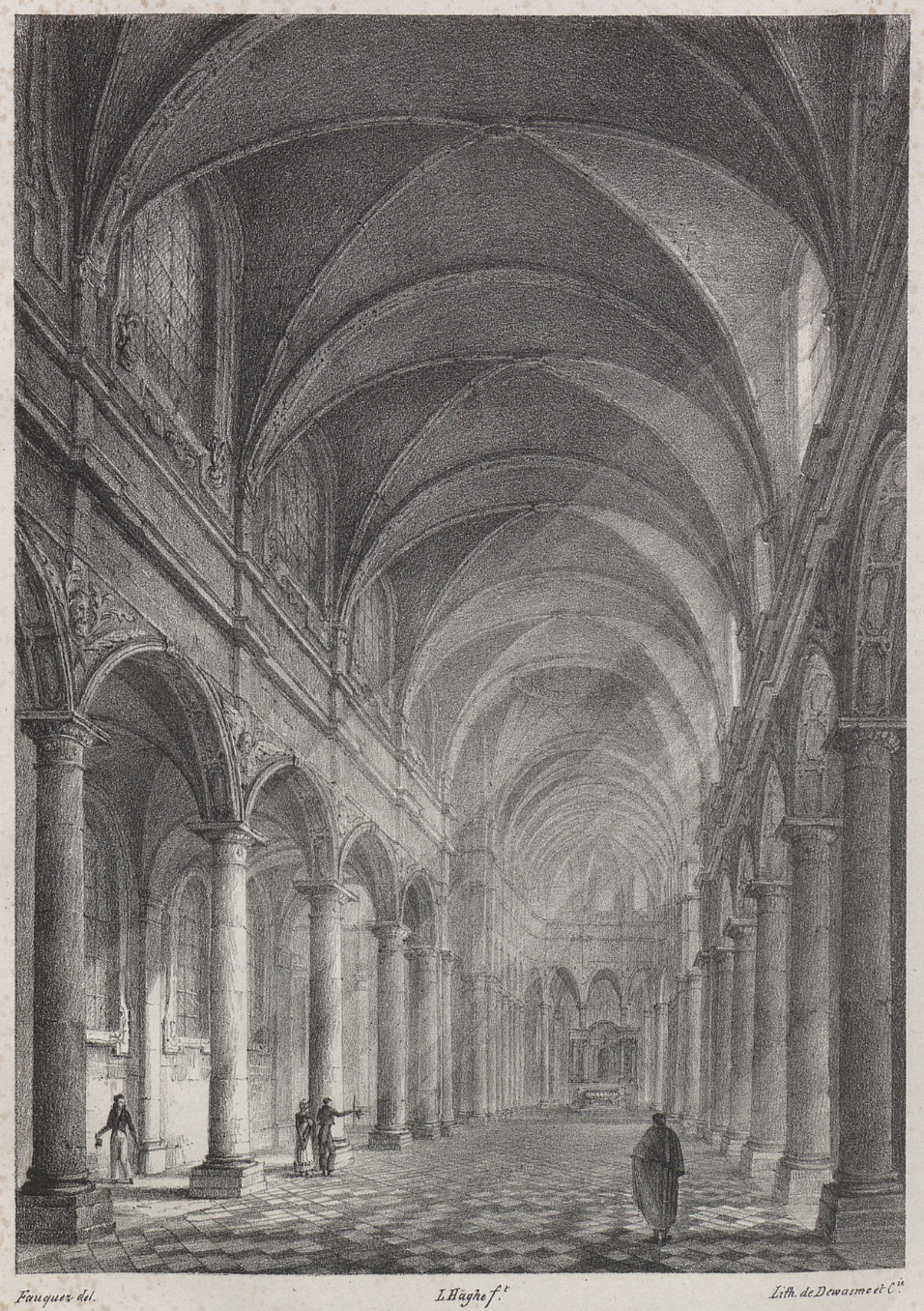 Kerkinterieur, Sint-Maartensabdij, Doornik